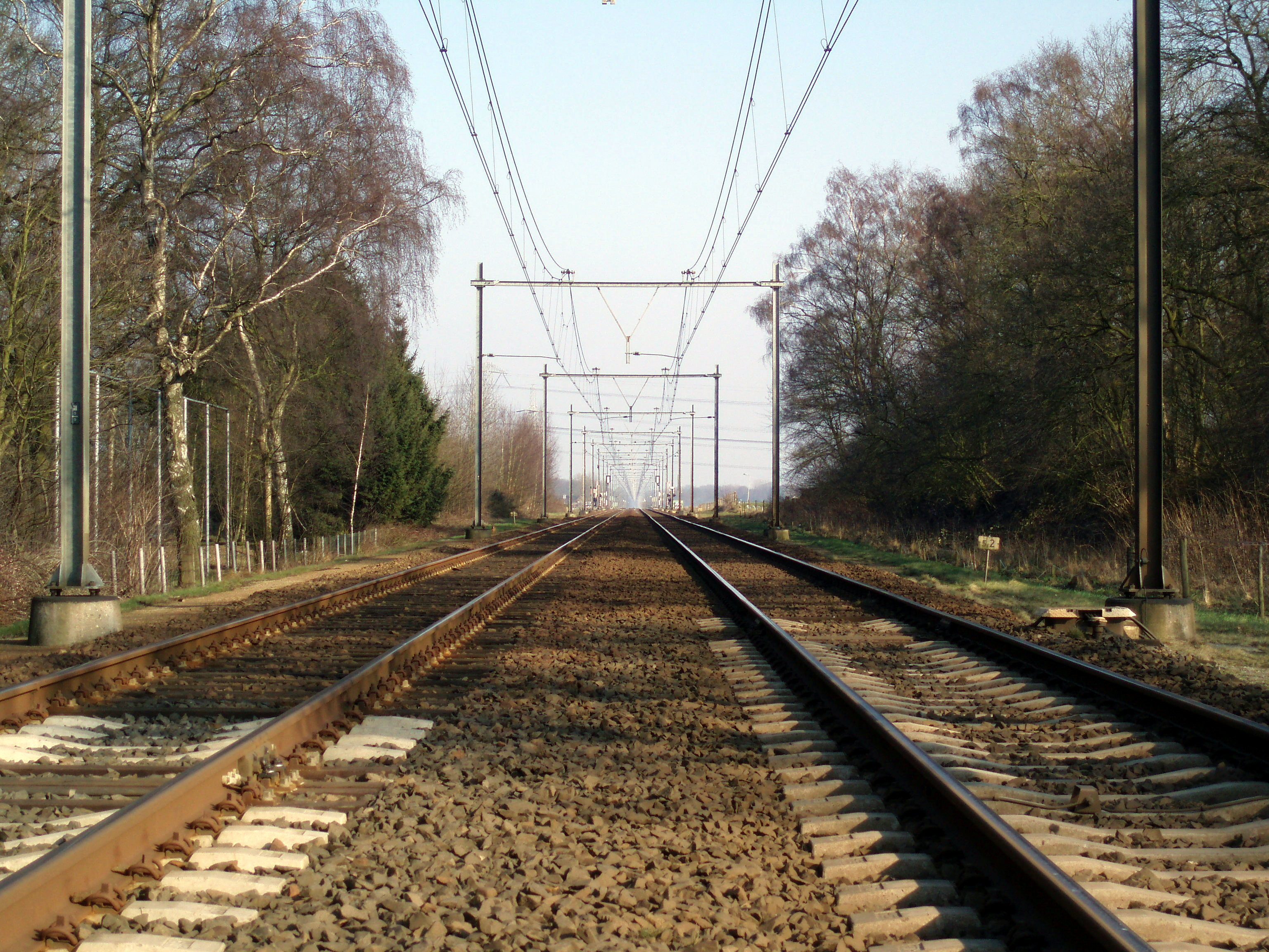 Spoorlijn bij Herfte in Zwolle. Als men hierbij betrapt op doordat hij/zij zó op het spoor staat, kost dat minstens €90